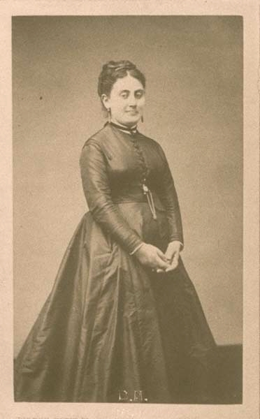 Madame Adrien Proust, mère de Marcel, photographe inconnu vers 1890. Exposition Proust, l'écriture et les arts, musée d'Orsay, Paris 1999. Paris.